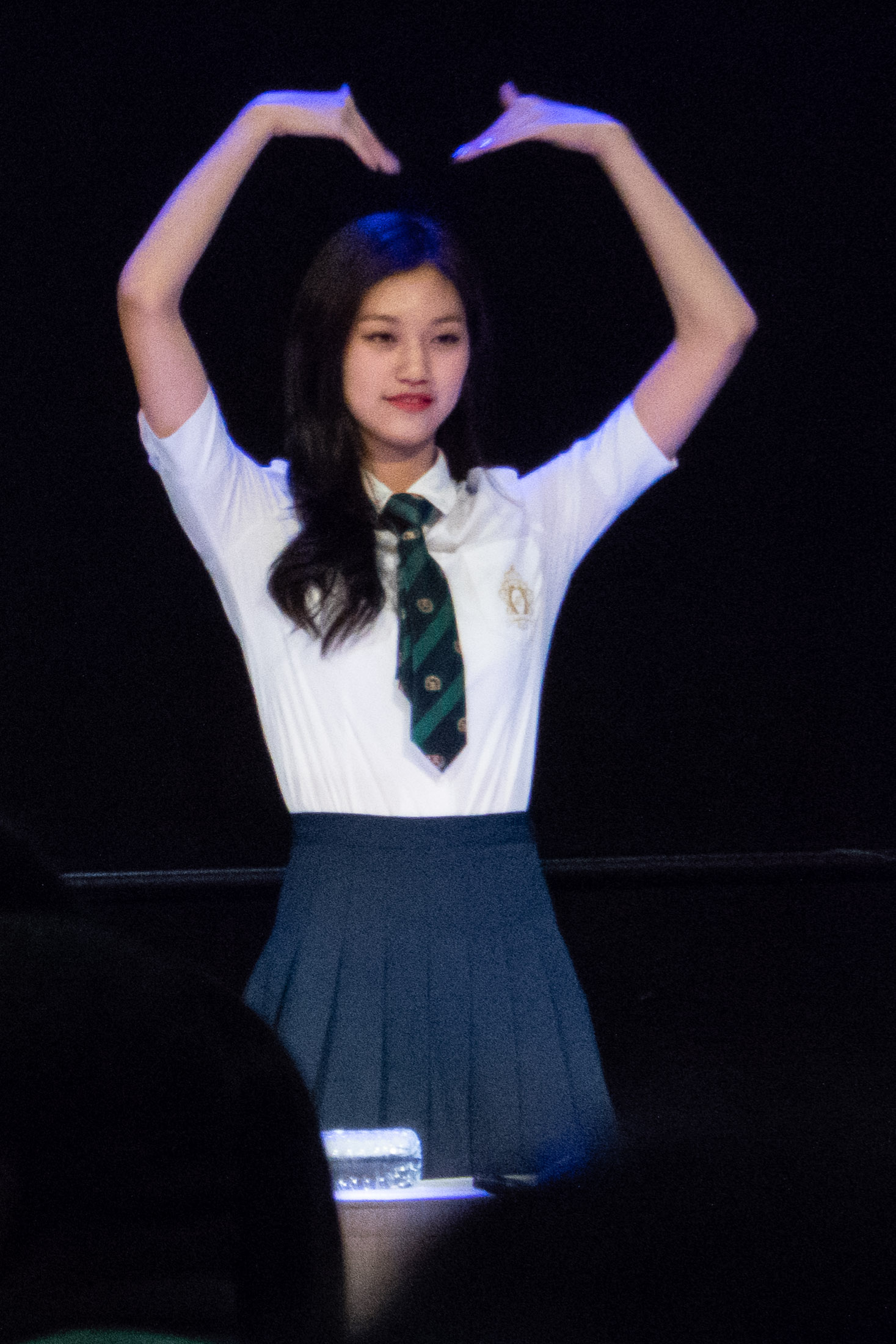 IOI Fan Engagement @ KCON 2016